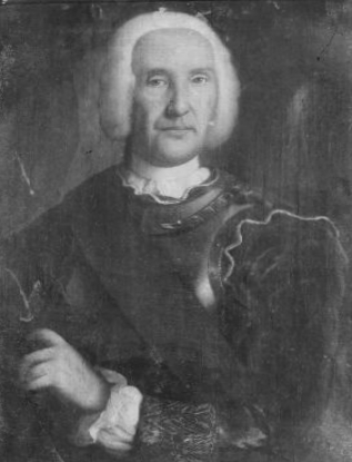 Gustav Otto Douglas (1687-1771)